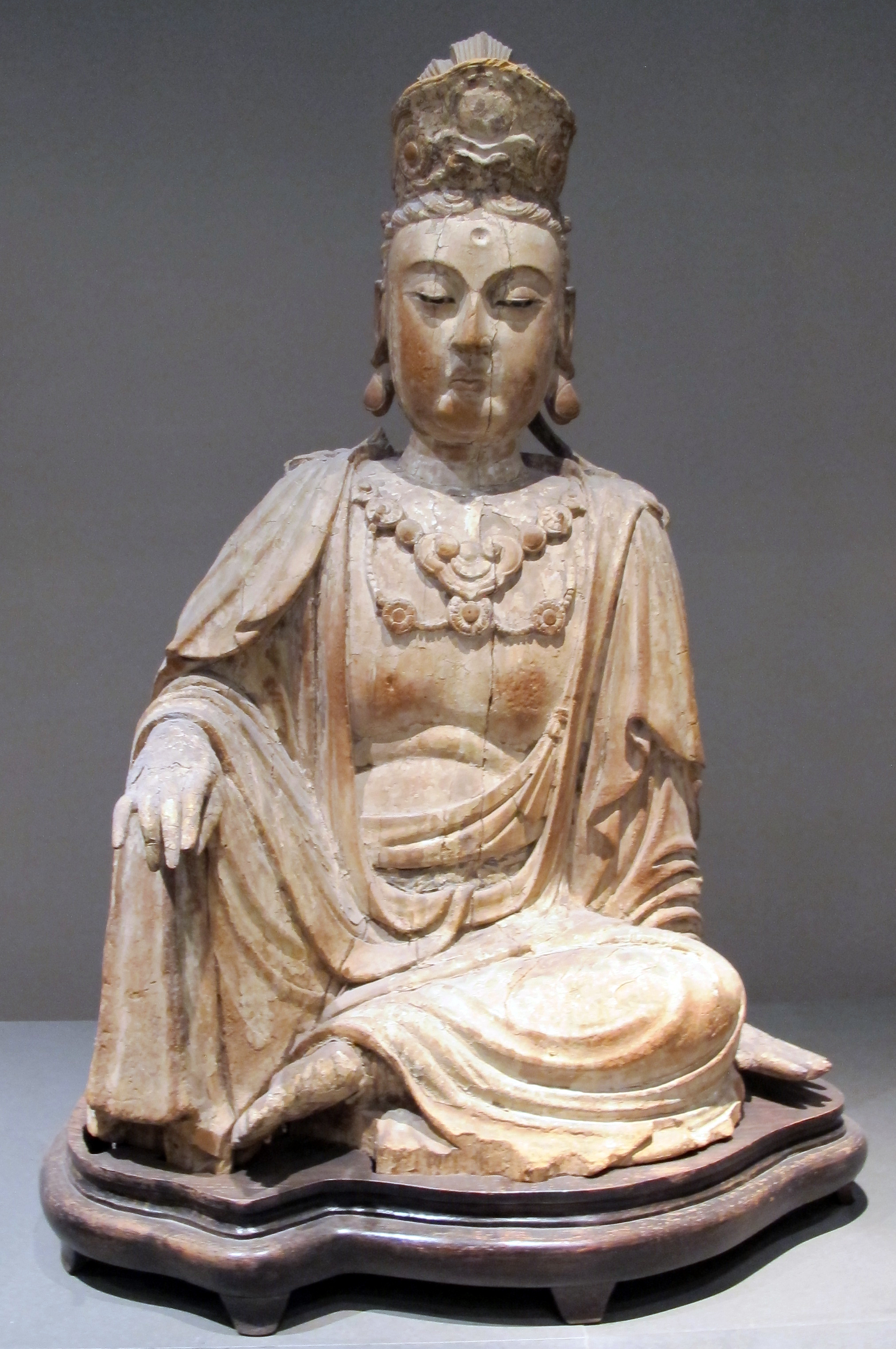 Museo Cernuschi, Parigi